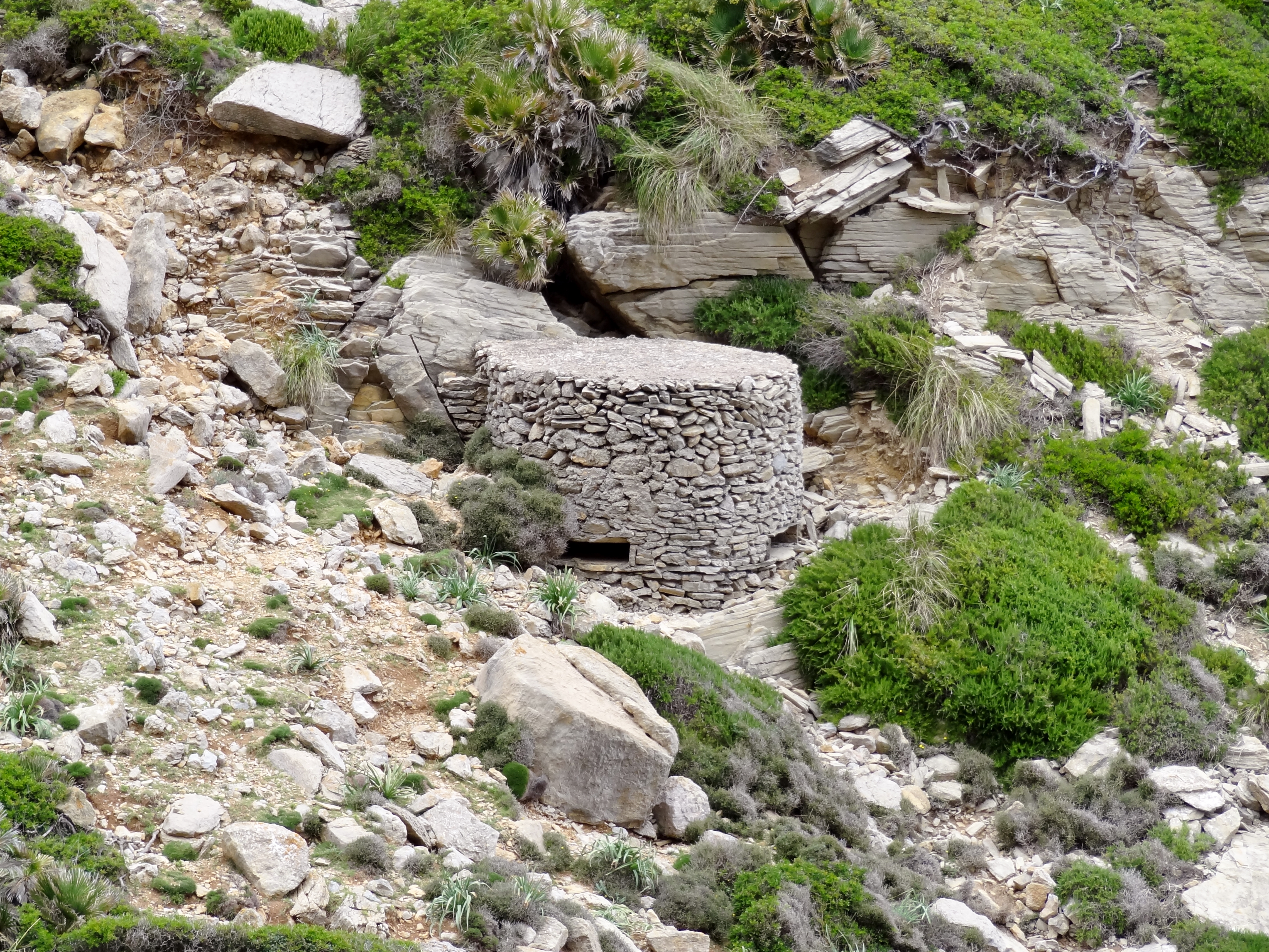 Maschinengewehrstand aus dem spanischen Bürgerkrieg an der Cala Bóquer in der Gemeinde Pollença, Mallorca, Spanien